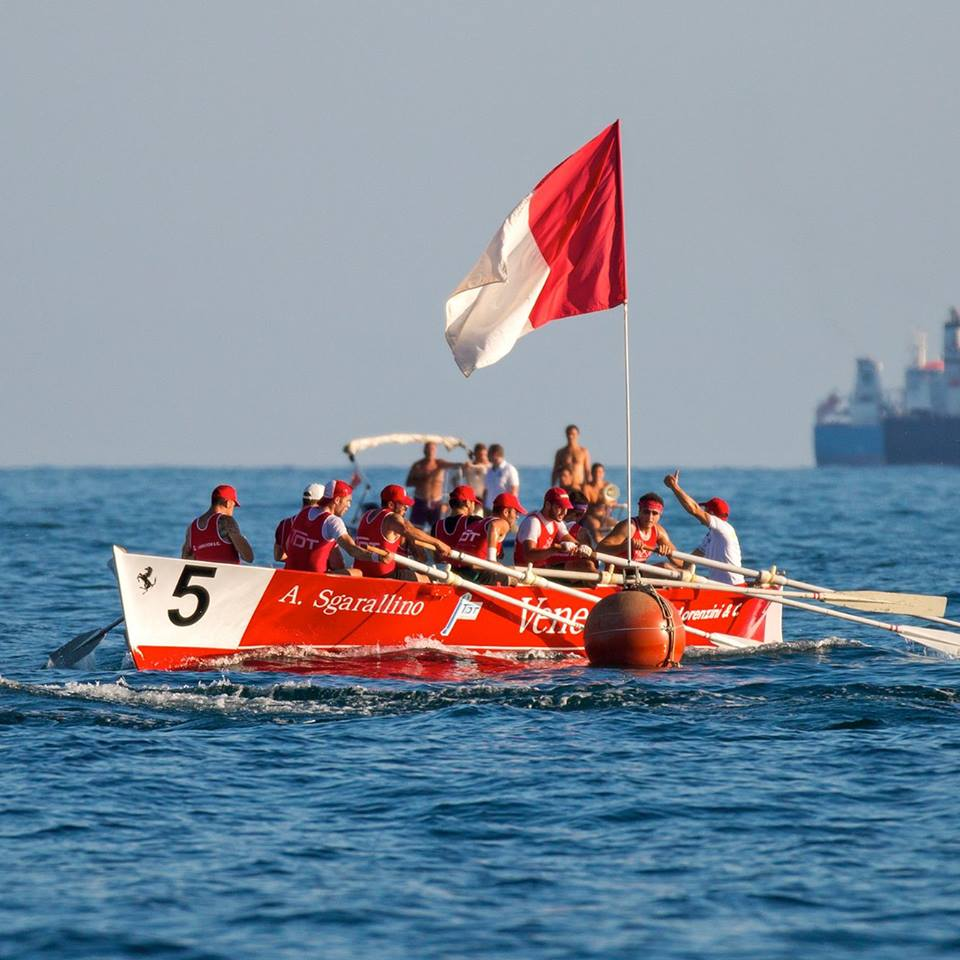 equipaggio Venezia in azione